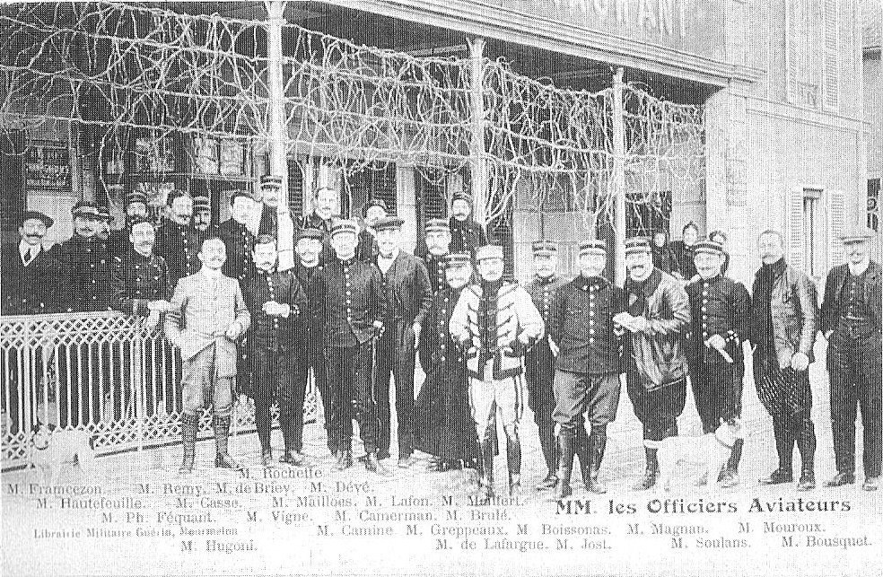 les aviateurs au restaurant de Mourmelon le grand .